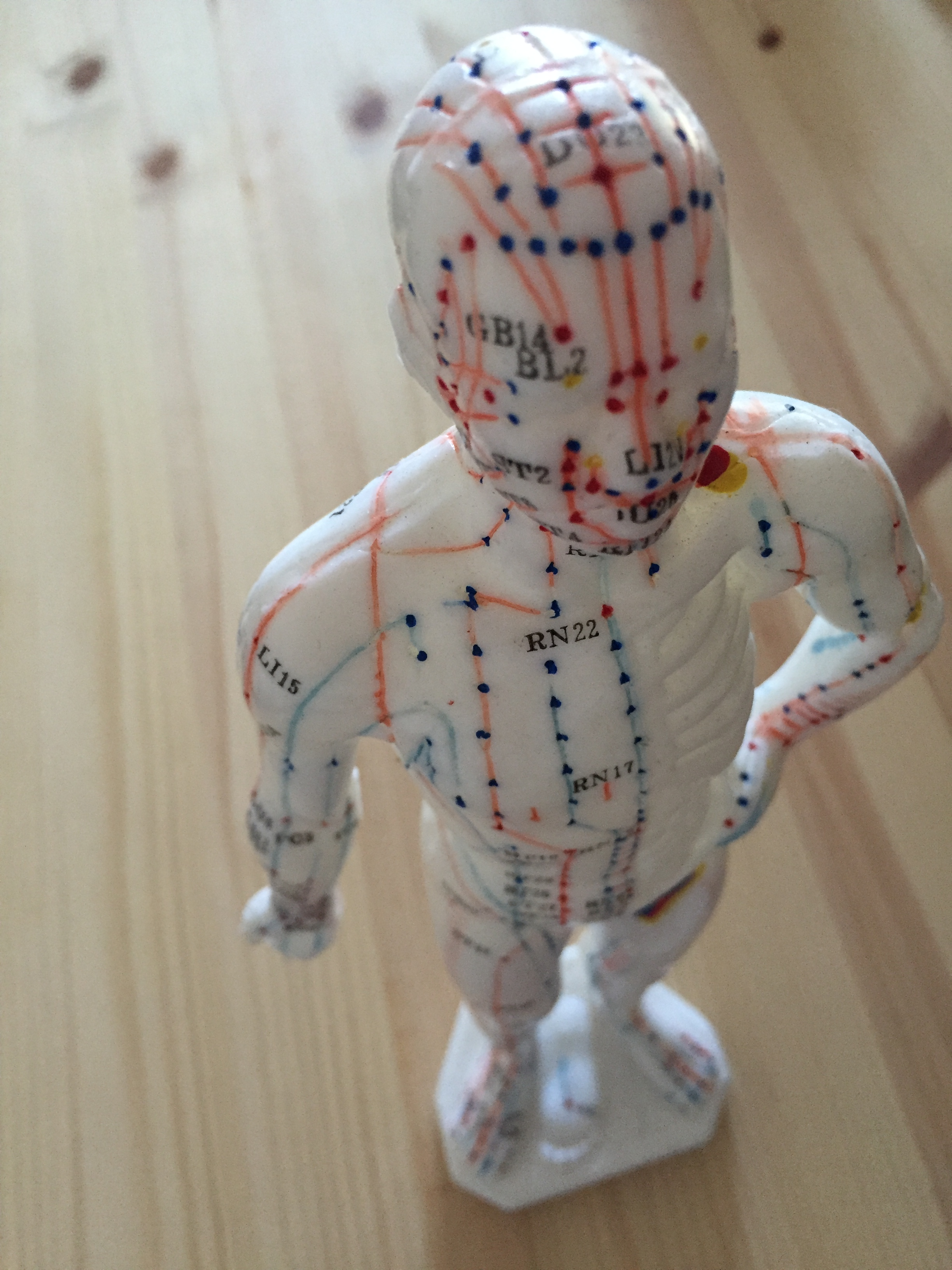 Puntos de acupuntura en los meridianos de la medicina china.